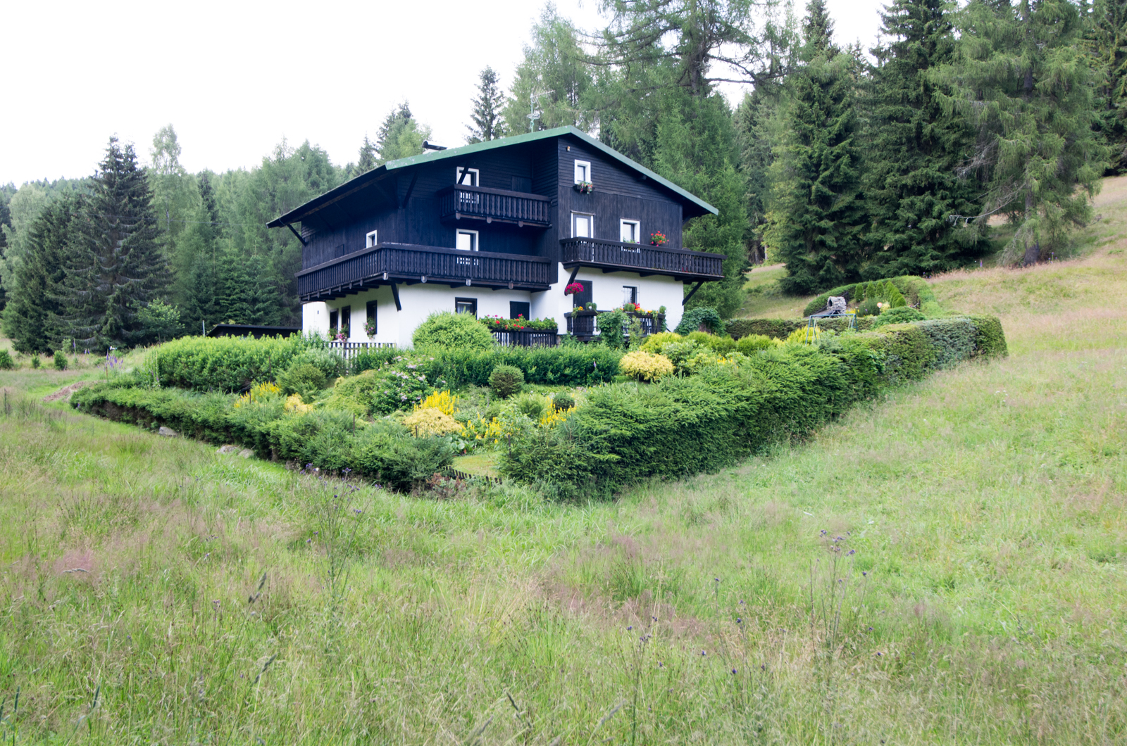 Nové Hamry, horská chata u naučné stezky Ruperta Fuchse, Krušné hory, okres Karlovy Vary